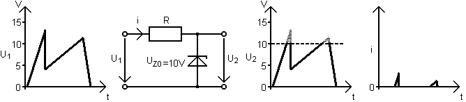 Spannungsstabilisierung mittels einer Z-Diode (GNU-Lizenz). Quelle: selbst gezeichnet